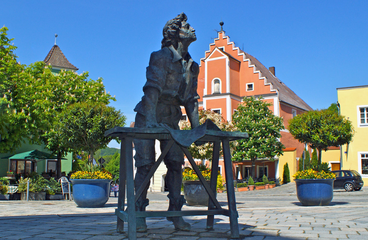 Standbild des Barock- und Rokokobaumeisters Johann Michael Fischer auf dem Marktplatz von Burglengenfeld